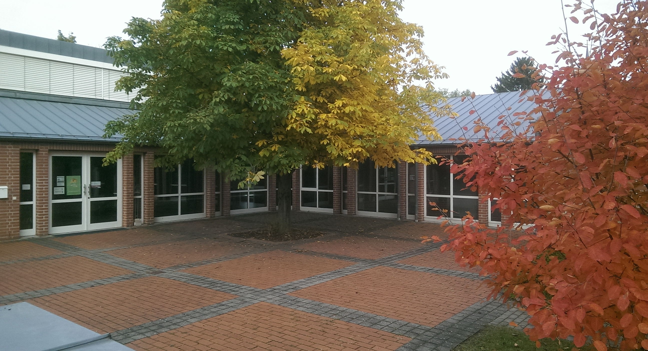 Innenhof vom Glockenturm aus gesehen